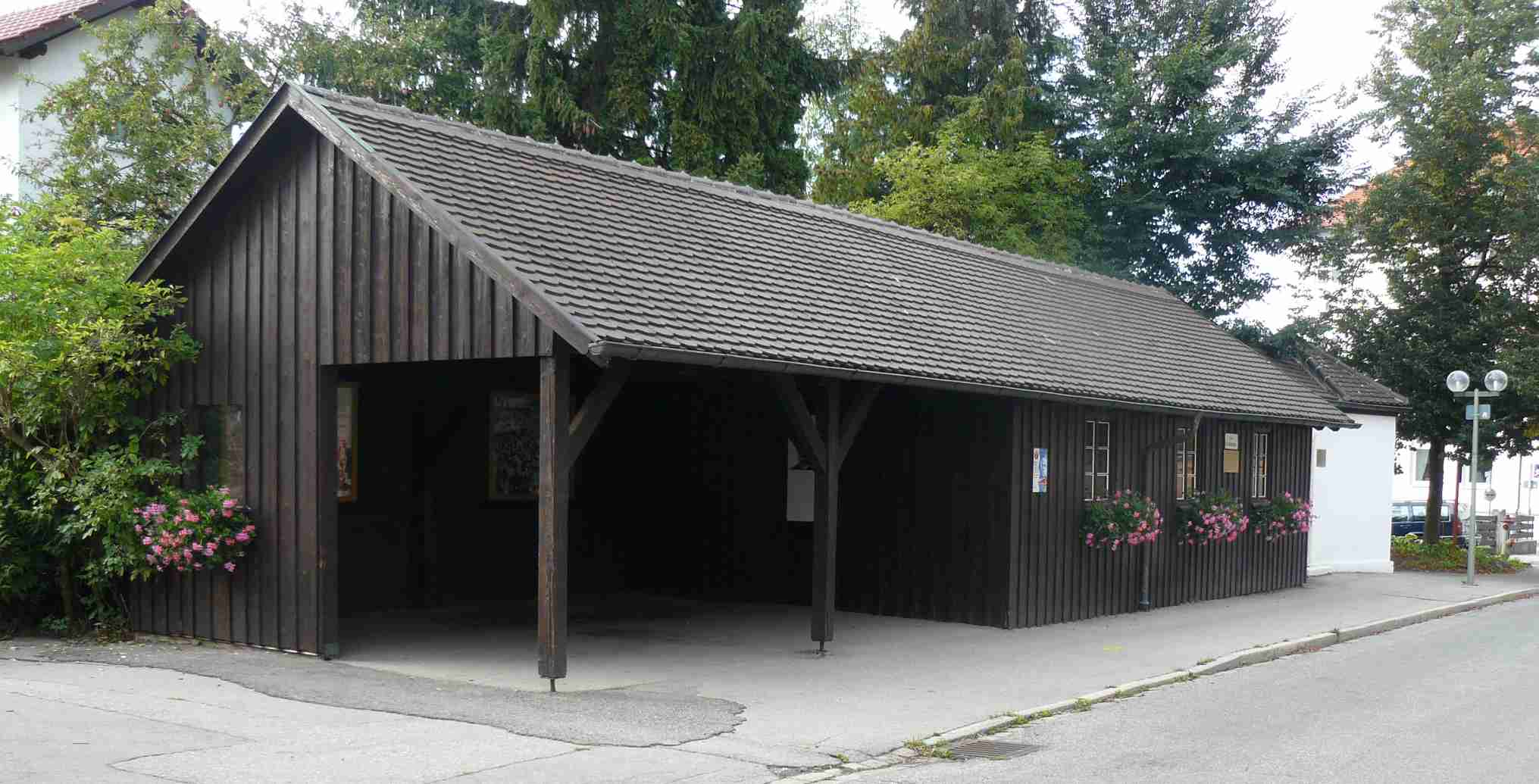 D-7-78-116-17 Altes Badehaus, Bad Woerishofen, Promenadestr. 2This is a photograph of an architectural monument.